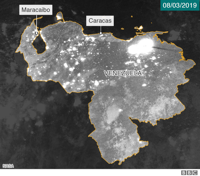 Imagem satélite nocturna Venezuela e Brazil a 8 de Março de 2019